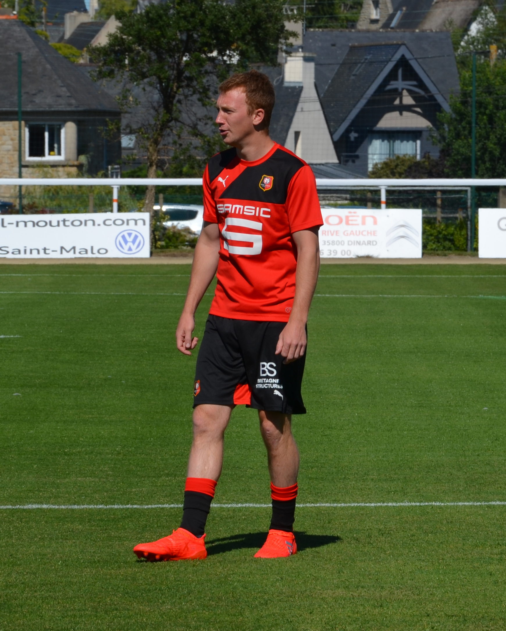 Photographie prise lors du match opposant le Stade rennais à l'USM Alger en match amical au stade Paul-Audrin de Dinard le 16 juillet 2016. Ici, Christian Brüls.